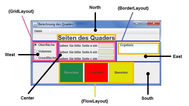 Java-Programmiersprache, BorderLayout, GridLayout, FlowLayout